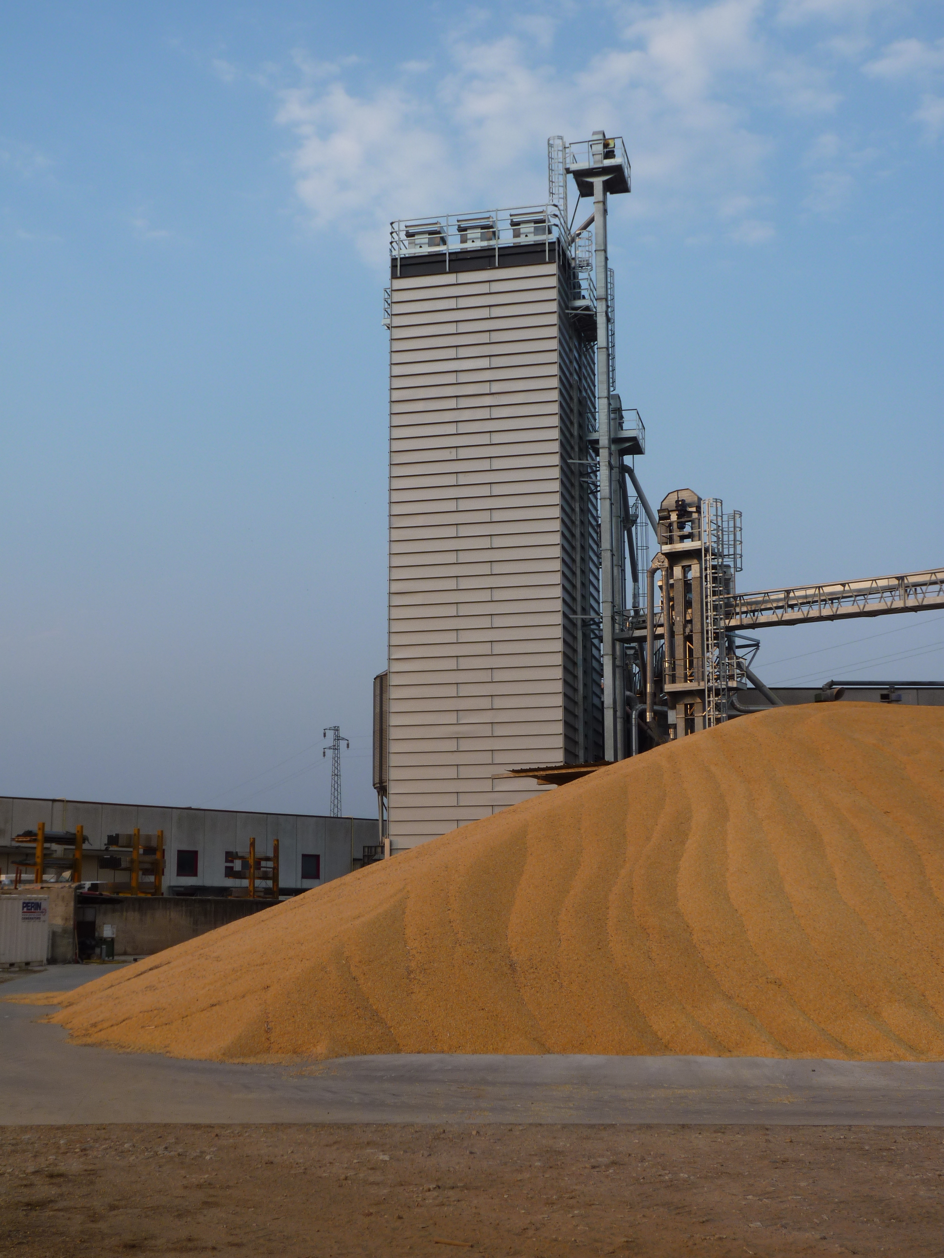 Стационарная зерносушилка поточного действия